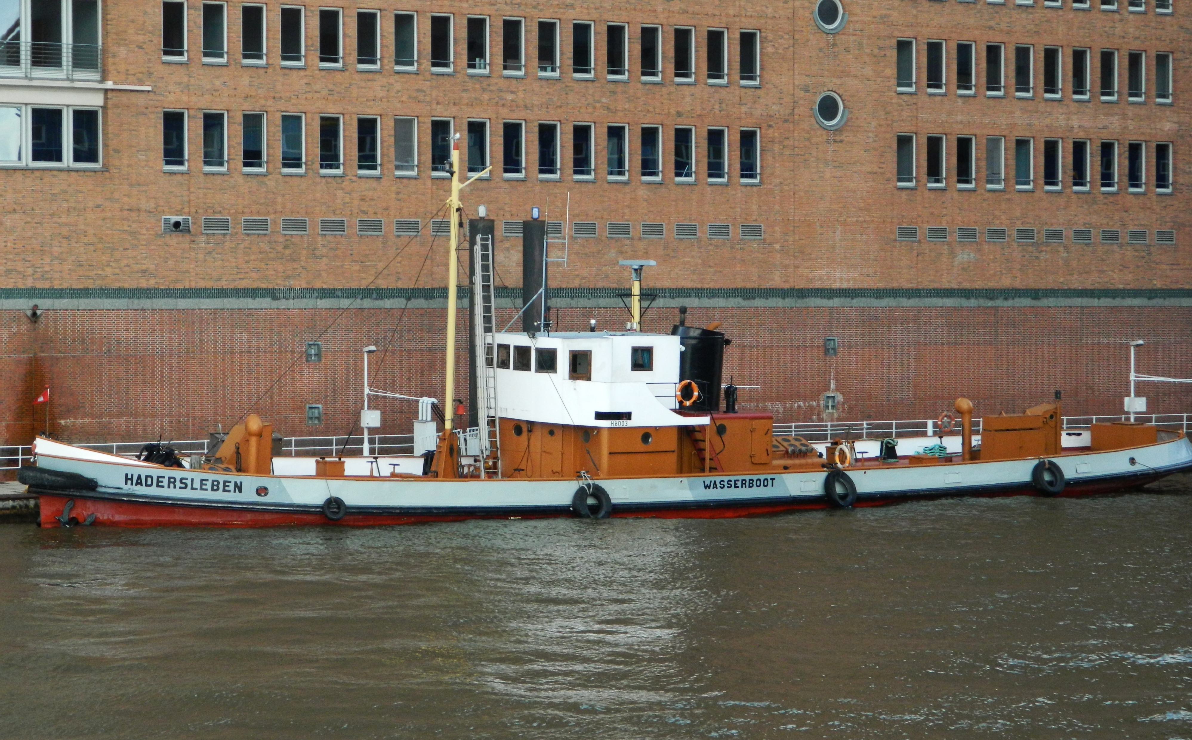 Wasserboot "Hadersleben" abgeladen im Hafen Hamburg (aus 1906, genieteter Stahlrumpf, 2012 außer Dienst gestellt) (2012)